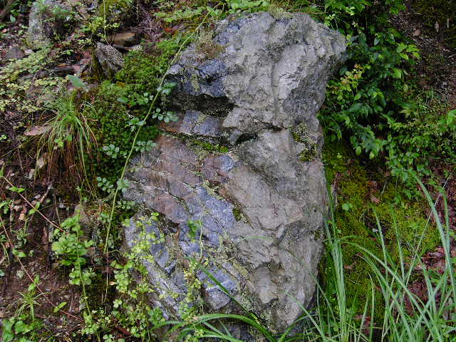 京都丹波高原の基盤層となる丹波帯 京都市左京区花脊の山中に見られる